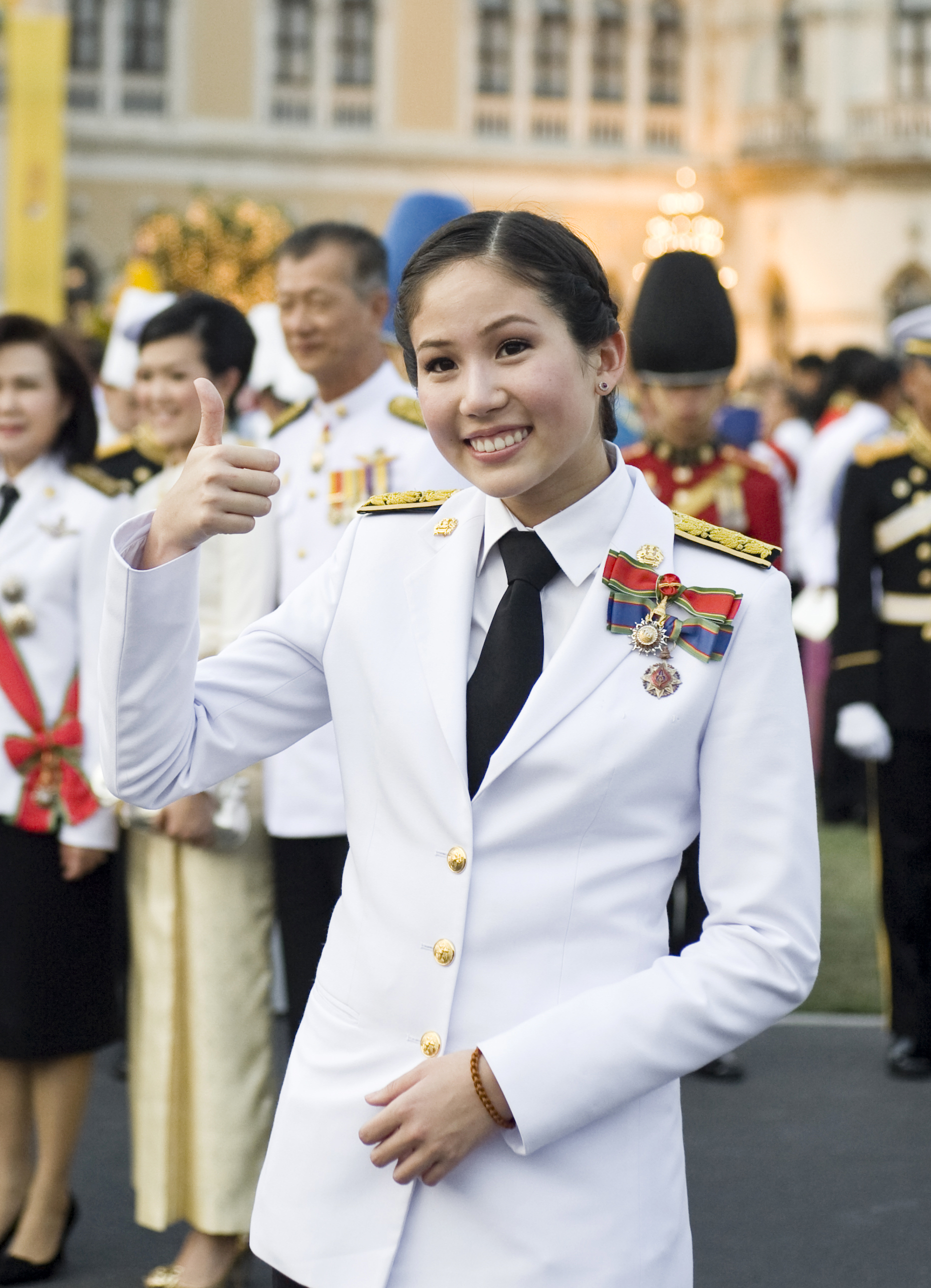 นายกรัฐมนตรีและภริยา ในนามรัฐบาลเป็นเจ้าภาพงานสโมสรสันนิบาตเฉลิมพระเกียรติเนื่องในวันเฉลิม พระชนมพรรษา พระบาทสมเด็จพระเจ้าอยู่หัว ณ สนามหญ้าหน้าตึกไทยคู่ฟ้า 7ธันวาคม2552 (The Official Site of The Prime Minister of Thailand Photo by พีรพัฒน์ วิมลรังครัตน์)